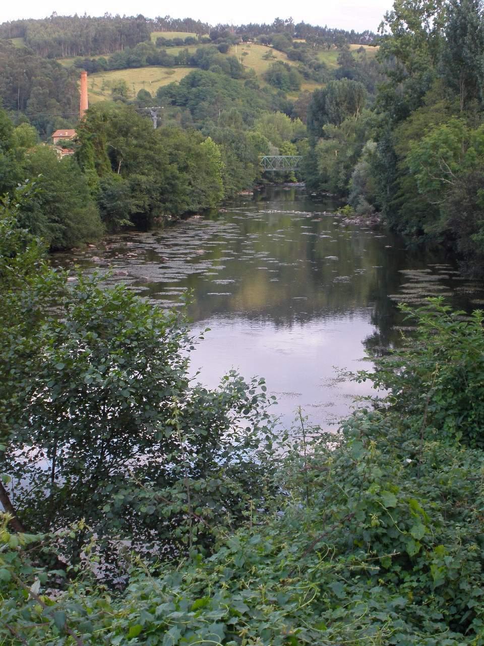 Río Asón a su paso por Udalla (Ampuero, Cantabria)